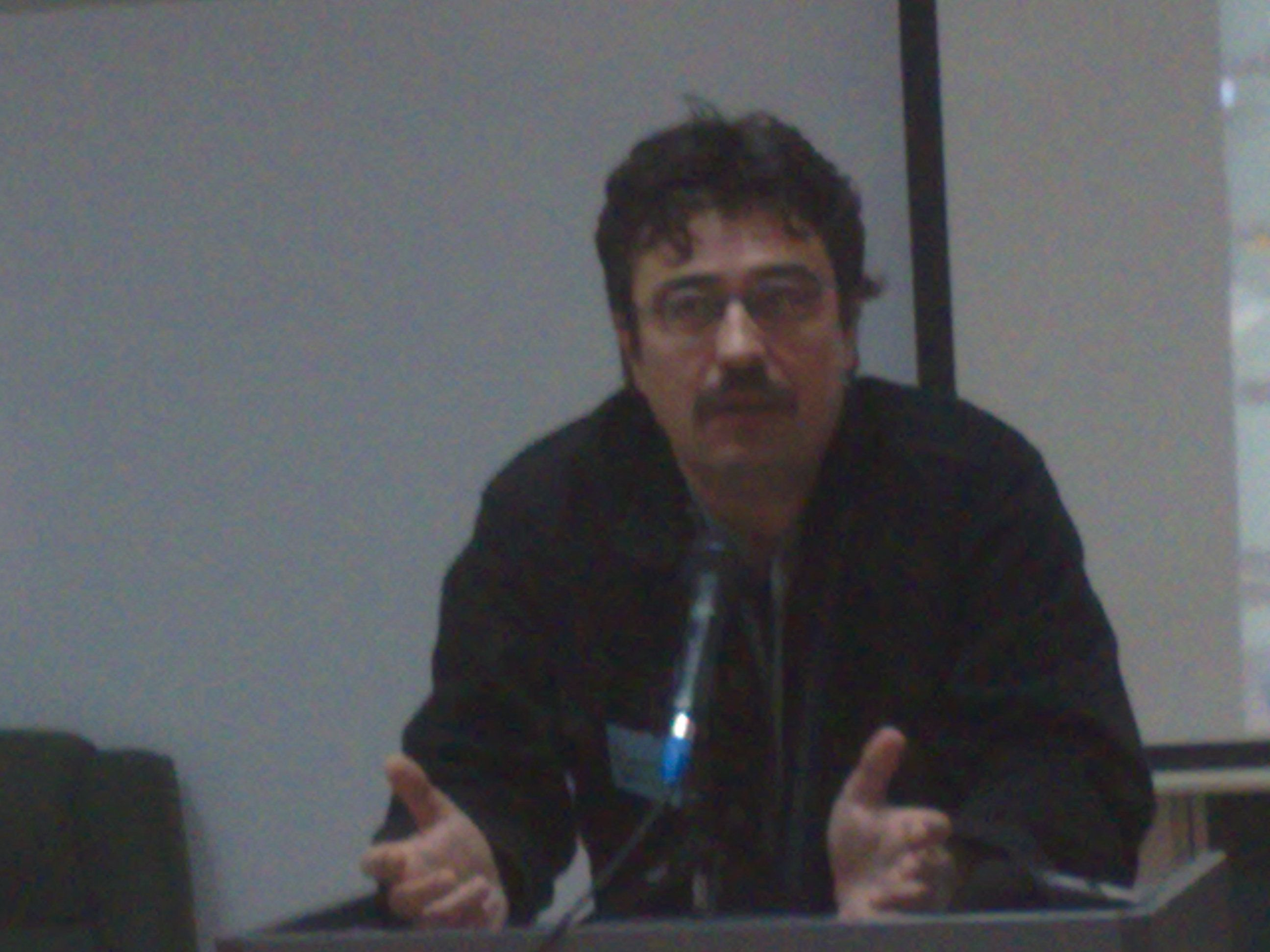 Damir Nikšić